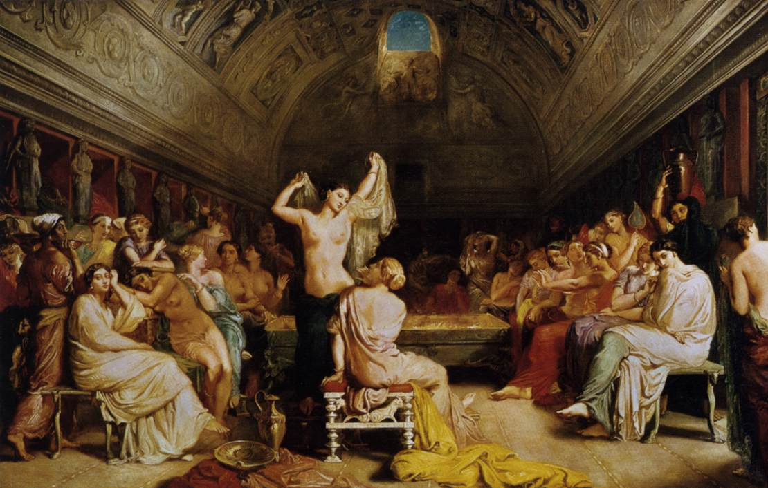 (Saal, in dem sich die Frauen von Pompeji nach dem Bad ausruhten und trockneten)